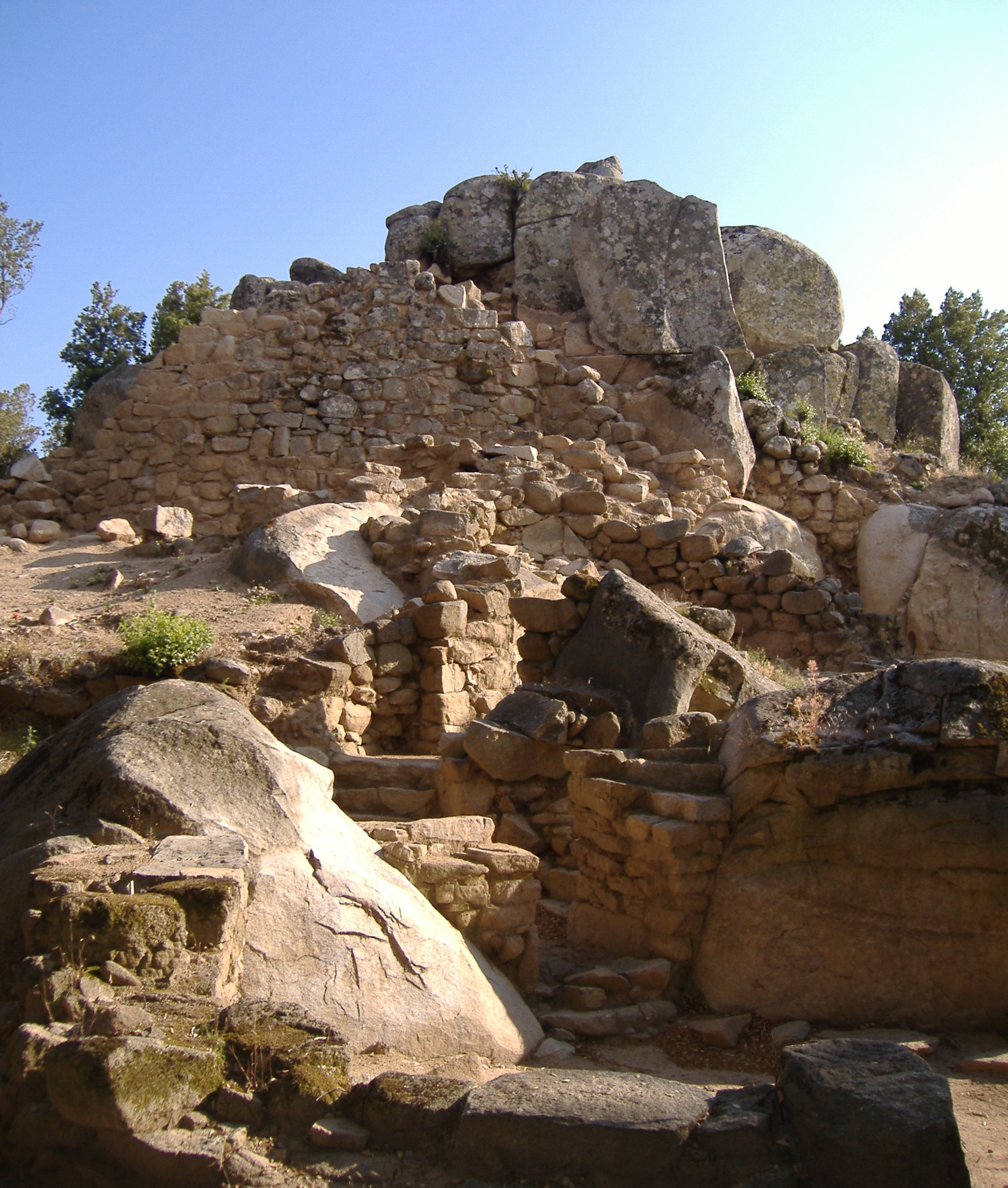 Nuraghe e parte del Villaggio Nuragico Gennaccili - Seleni - XV-XIV secolo a.C. This is a photo of a monument which is part of cultural heritage of Italy.